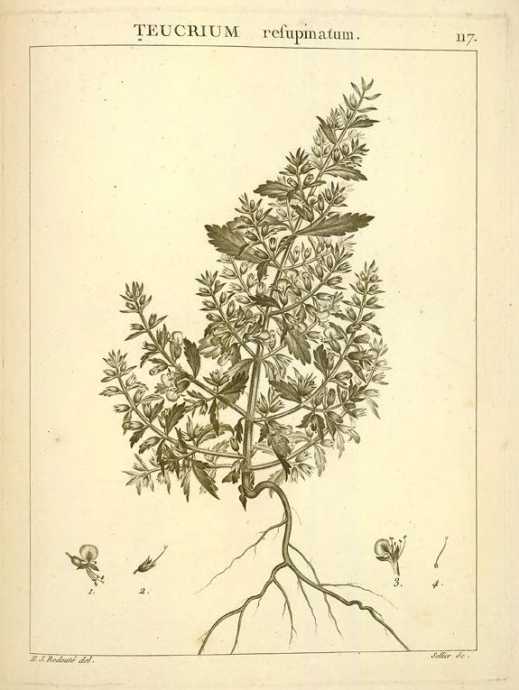 illsutration de Teucrium resupinatum